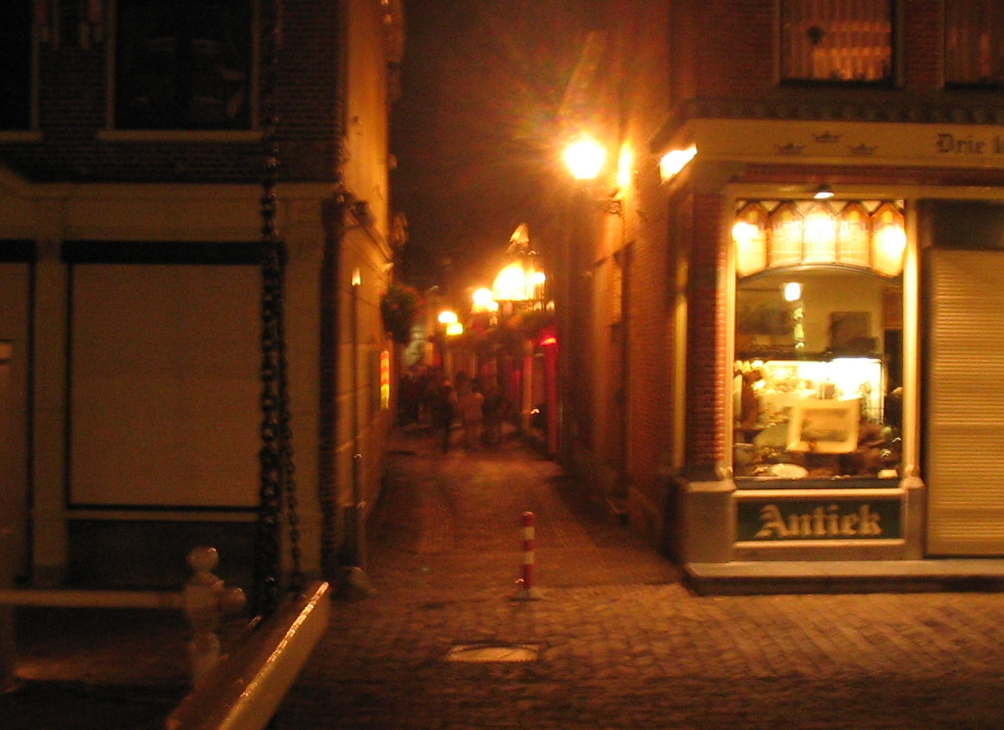 onscherp, maar geeft een indruk eigen foto Achterdam